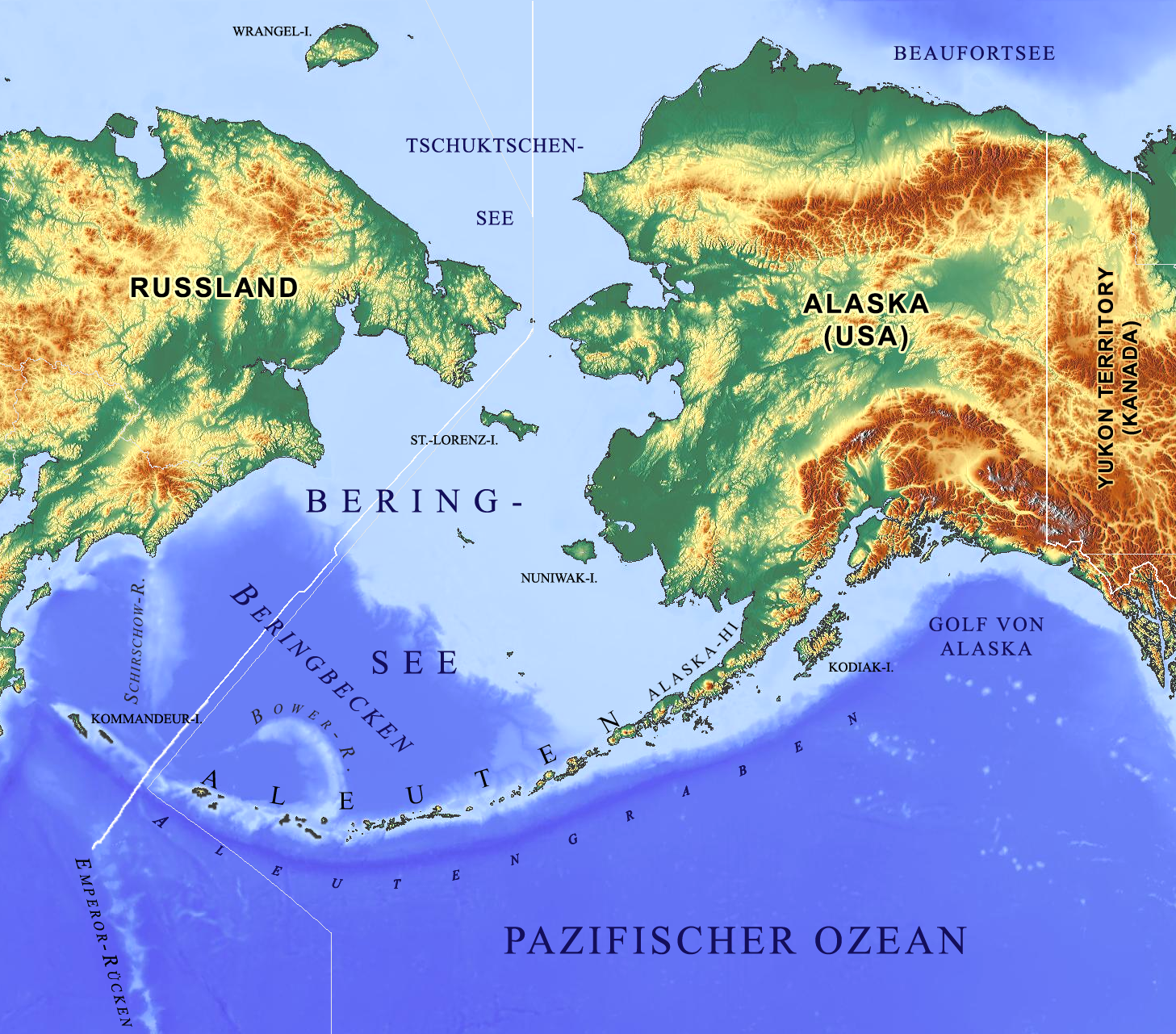 Physische Geographie Alaskas und der Beringsee mit Schwerpunkt auf der Ozeanographie der Beringsee und des Kommandeur-Aleuten-Inselbogens